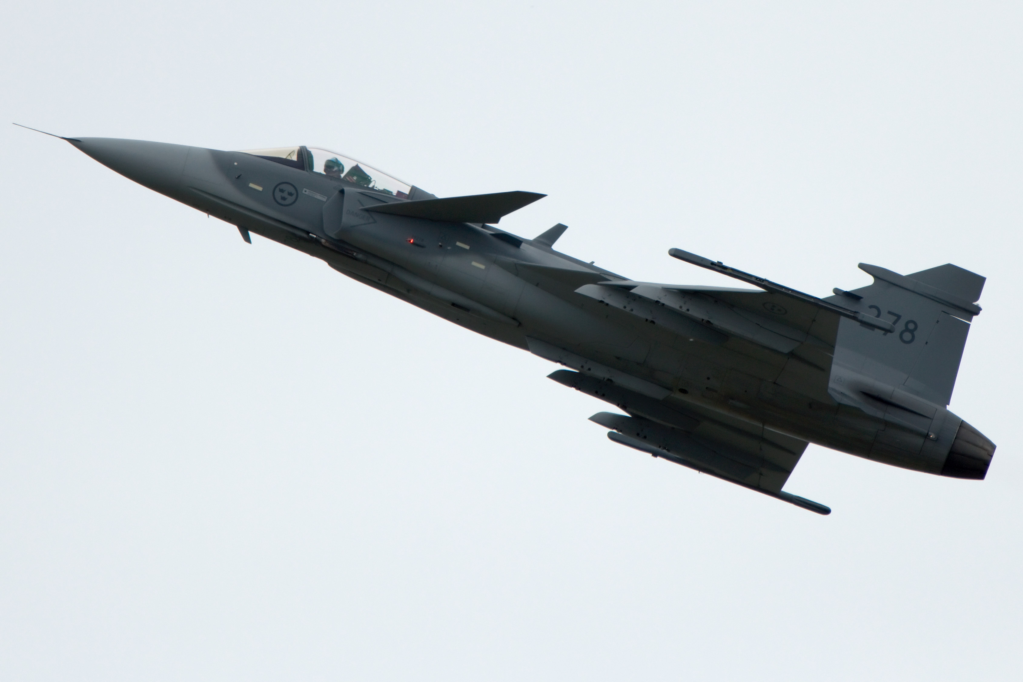 Saab JAS-39 at ILA 2010